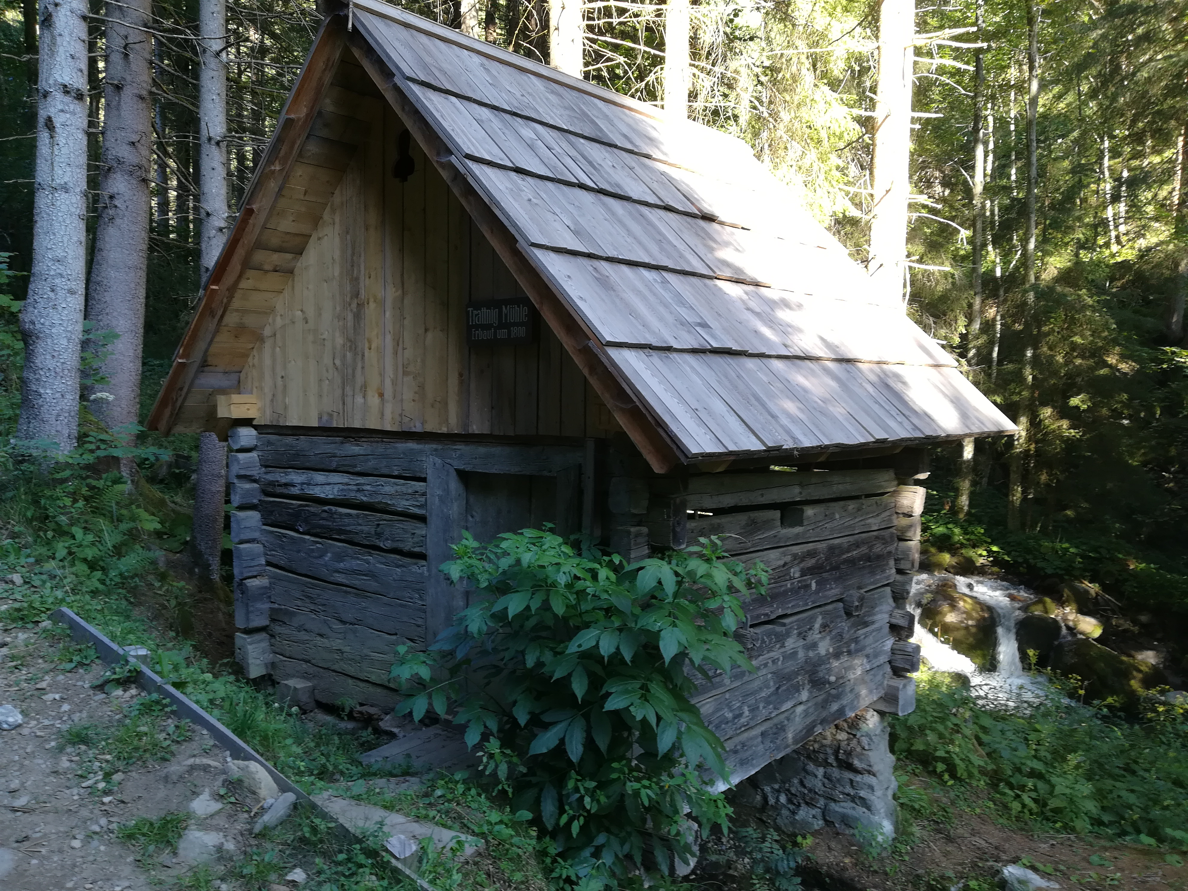 Trattnigmühle in Kaning bzw. am Kaninger Mühlenwanderweg. Um 1800 erbaut.